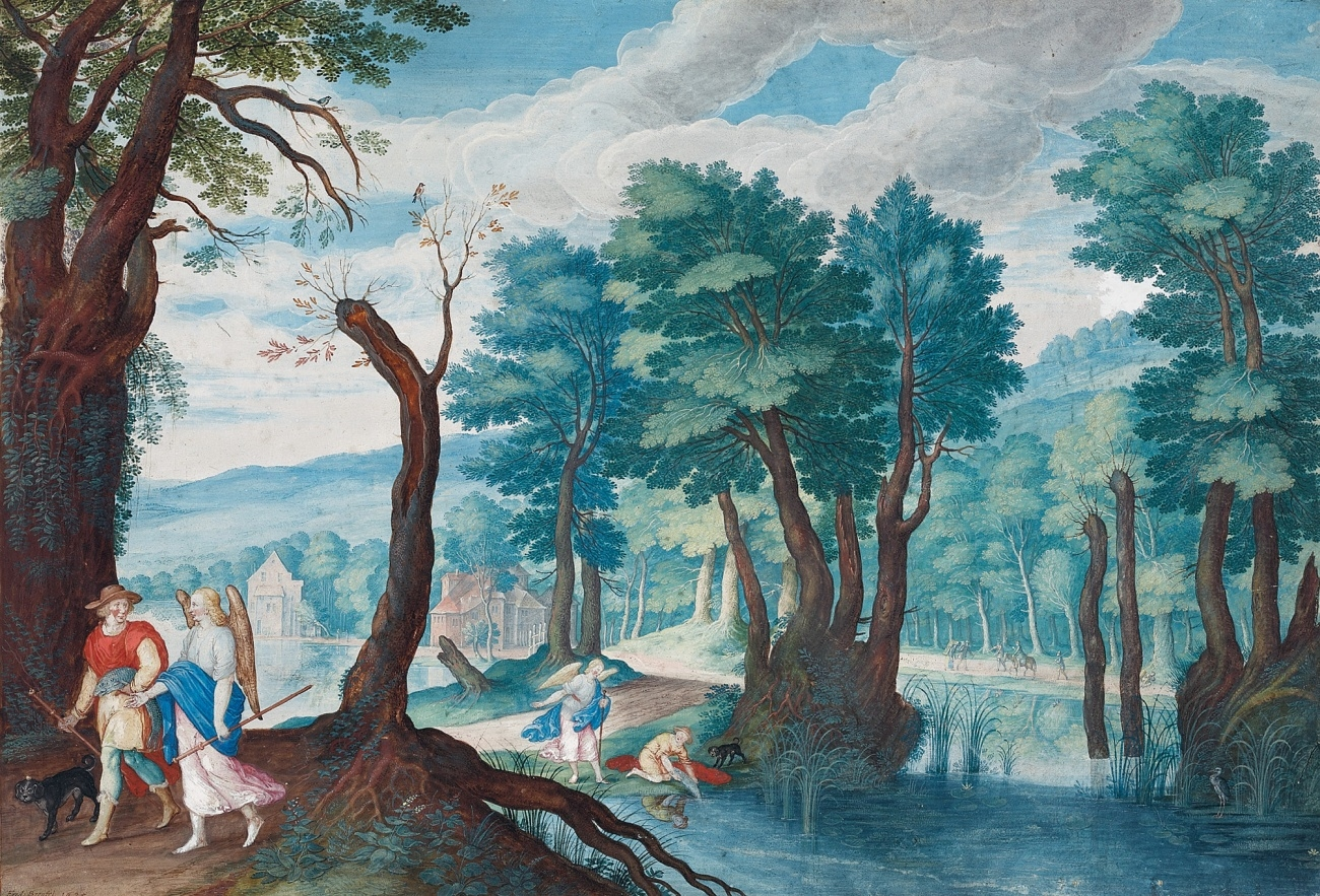 Landschaft mit Tobias und dem Engel Raphael. Gouache auf Papier, montiert. 17,5 x 26 cm. Signiert und datiert unten links: Frid. Brentel 1625